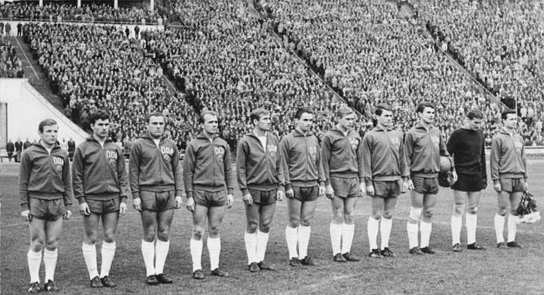 Zentralbild-Wendorf sche-fe 31.10.67 Fußball-Nationalmannschaft der DDR. (v.l.n.r.) Günter Hoge, Wolfram Löwe, Jürgen Nöldner, Klaus Urbanczyk, Herbert Pankau, Henning Frenzel, Bernd Bransch, Harald Irmscher, Wolfgang Wruck, Torwart Wolfgang Blochwitz und Mannschaftskapitän Dieter Erler.